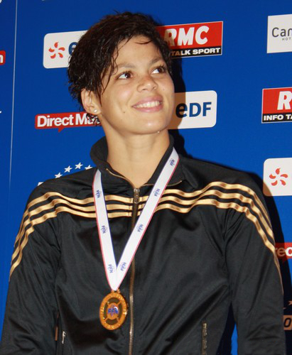 Coralie Balmy lors des Championnats de France en petit bassin 2012